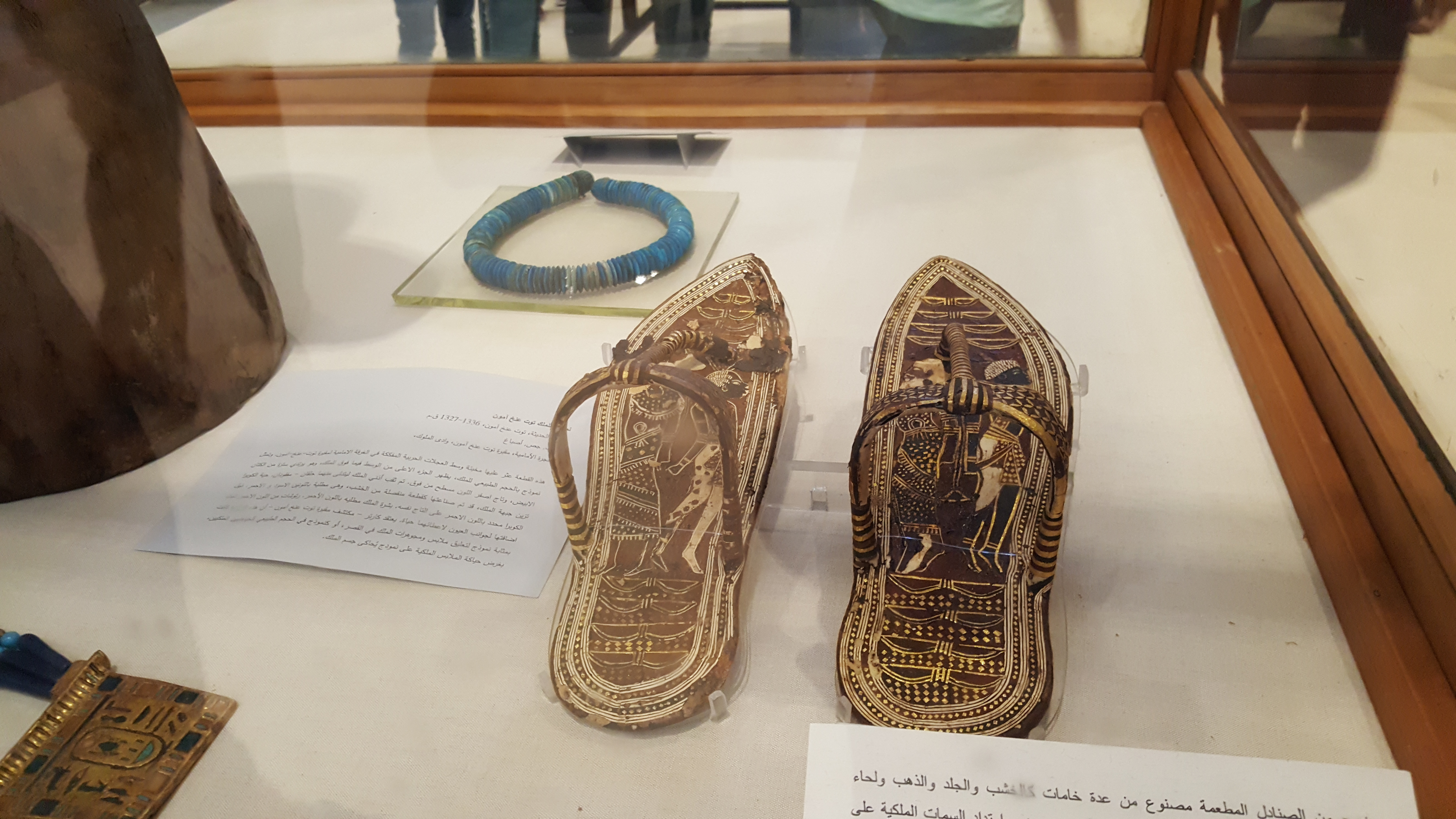 Egyptian Museum (Cairo)